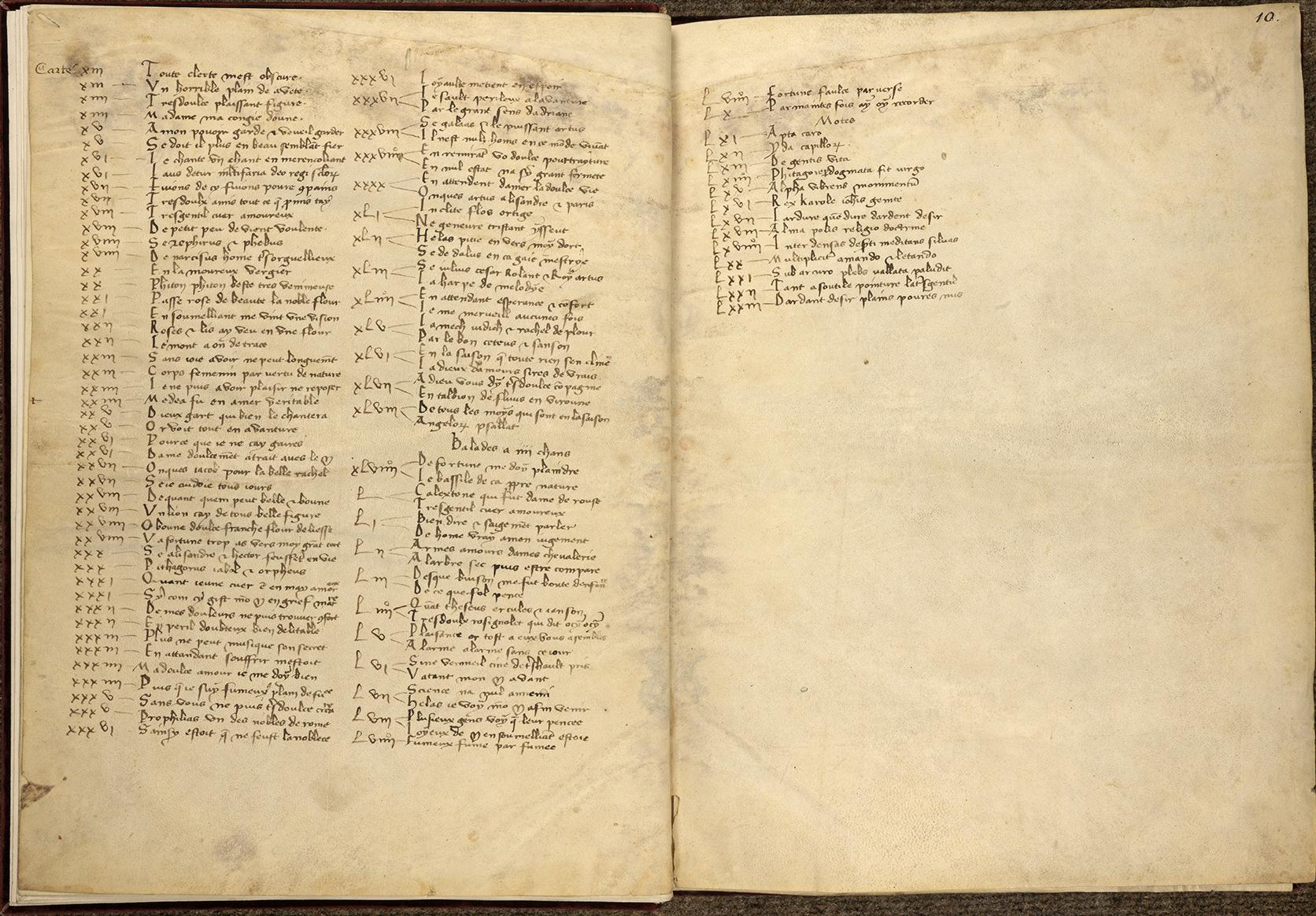 Codex Chantilly